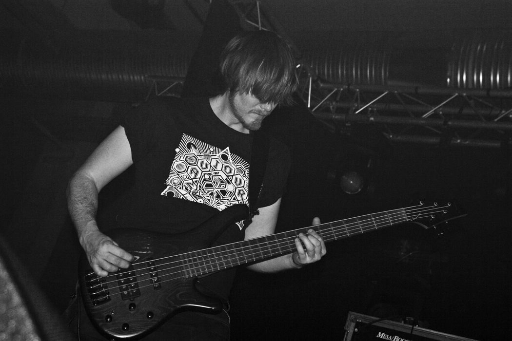 Foto: Rosario López